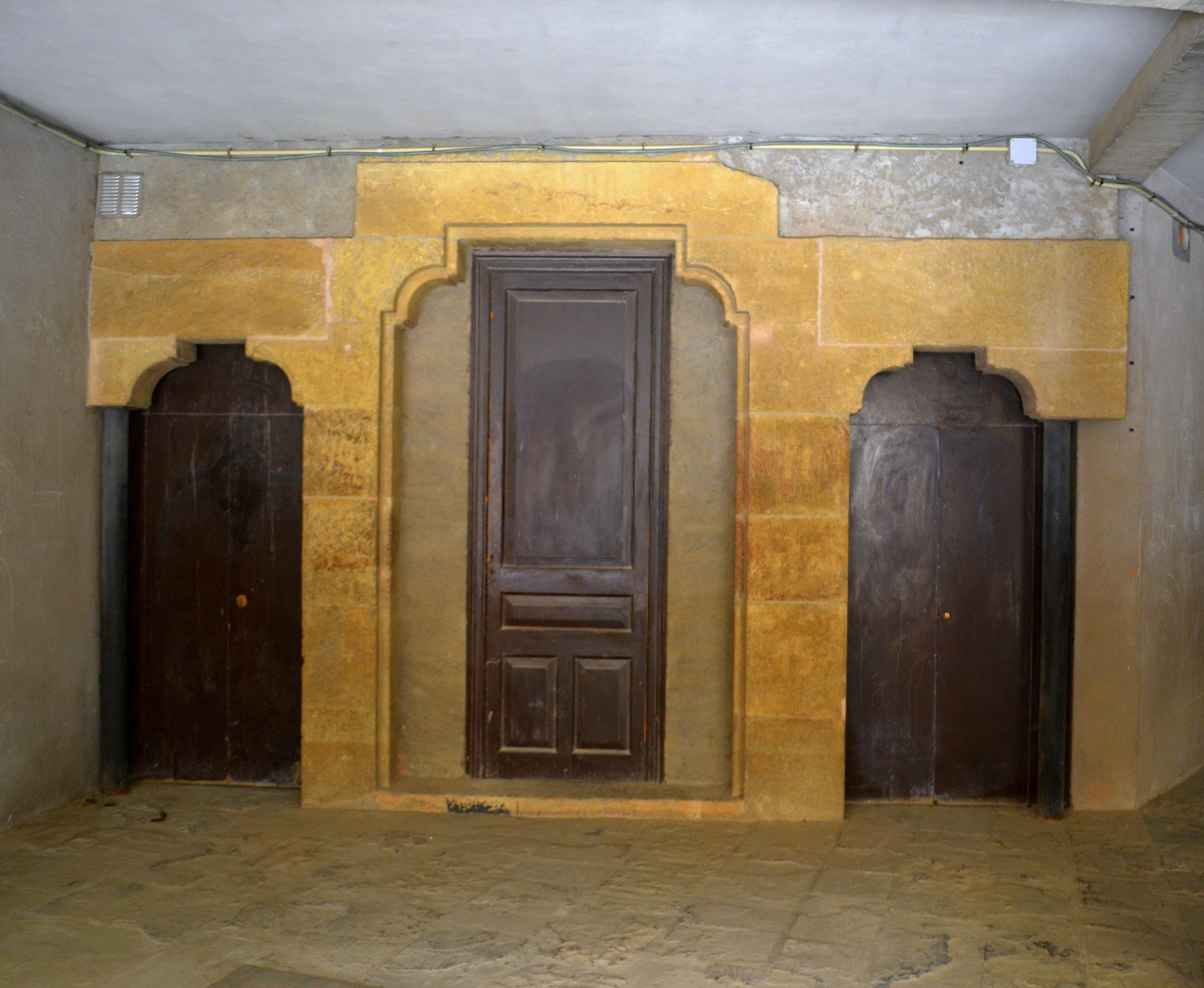 Ajuntament de Calaf, Anoia.